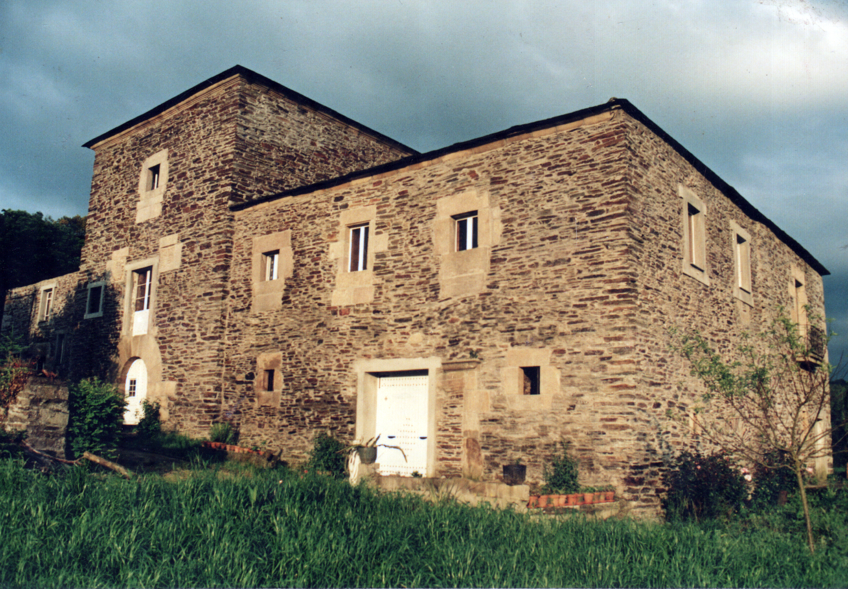 Casa Grande de Perros de Calvor (Sarria)